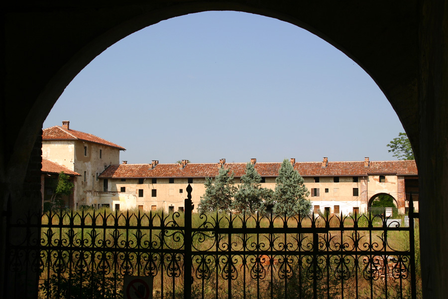 Particolare del complesso della Cascina Sforzesca a Vigevano (PV)